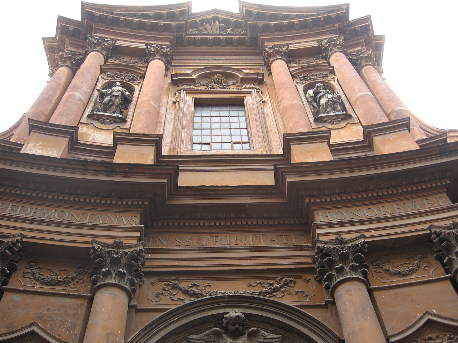 Description= Church of Santissima Trinità sei Pellegrini, Rome - Façade